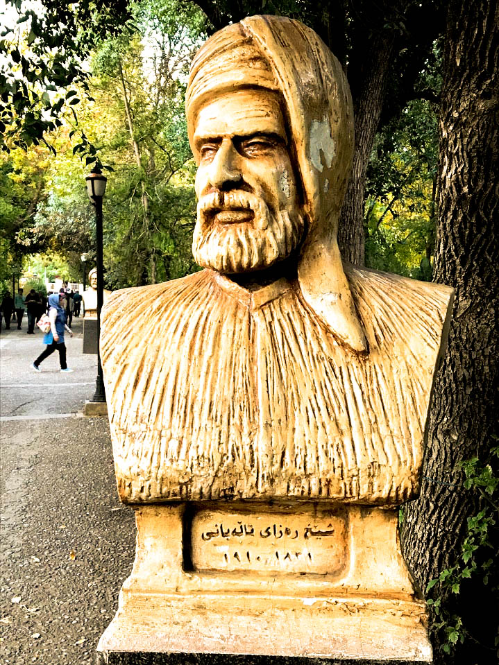 کوردی: پەیکەری شێخ ڕەزای تاڵەبانی لە باخی گشتی لە سلێمانی